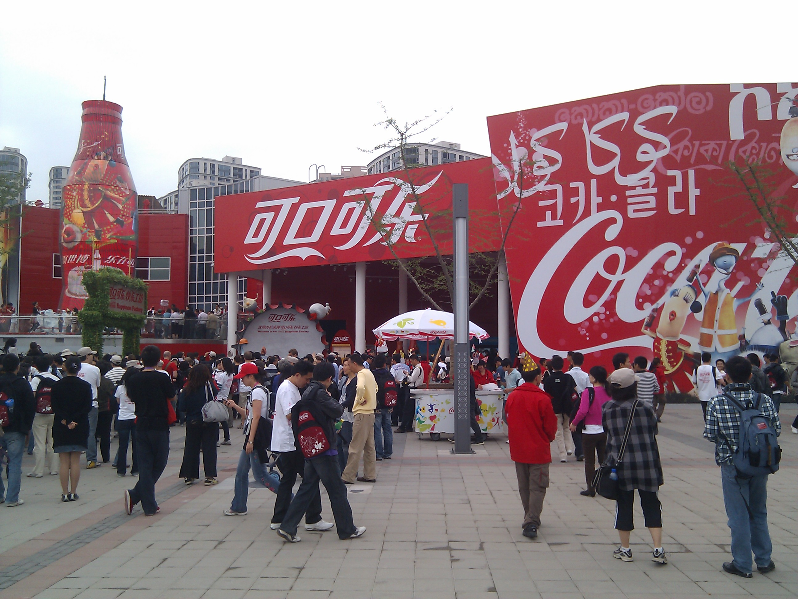 Coca cola pavilion